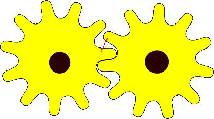 fatta da me